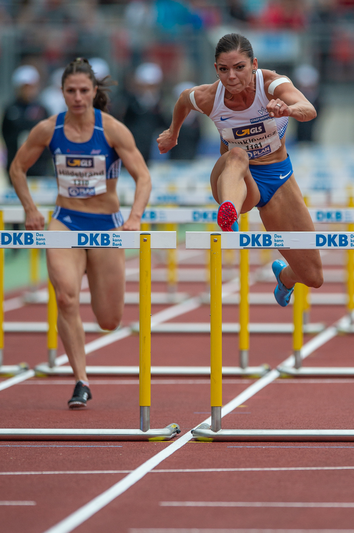 100-Meter-Hürdenlauf,DLV,Deutsche Leichtathletik Meisterschaften 2018,Deutscher Leichtathletik-Verband,Max-Morlock-Stadion,Pamela Dutkiewicz